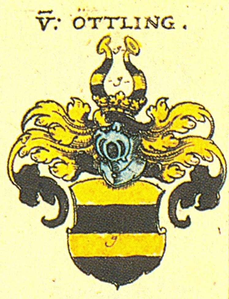 Wappen der Bayerischen Adelsfamilie von Öttling